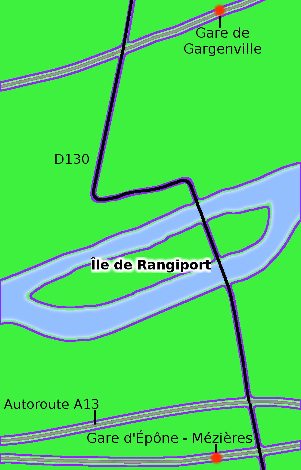 Île de Rangiport. Communauté urbaine Grand Paris Seine et Oise.